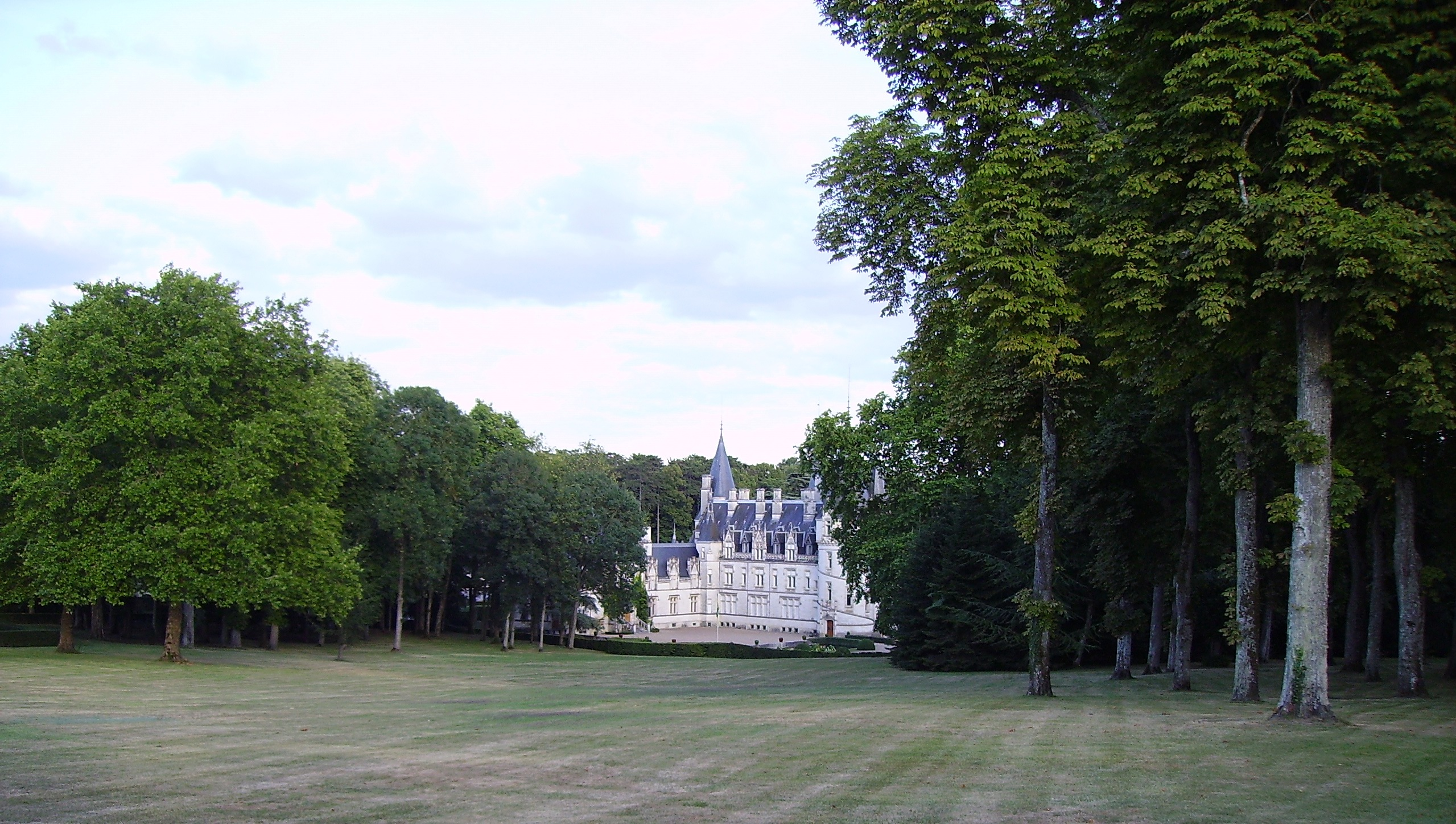 Château du Nozet (Nièvre, France).